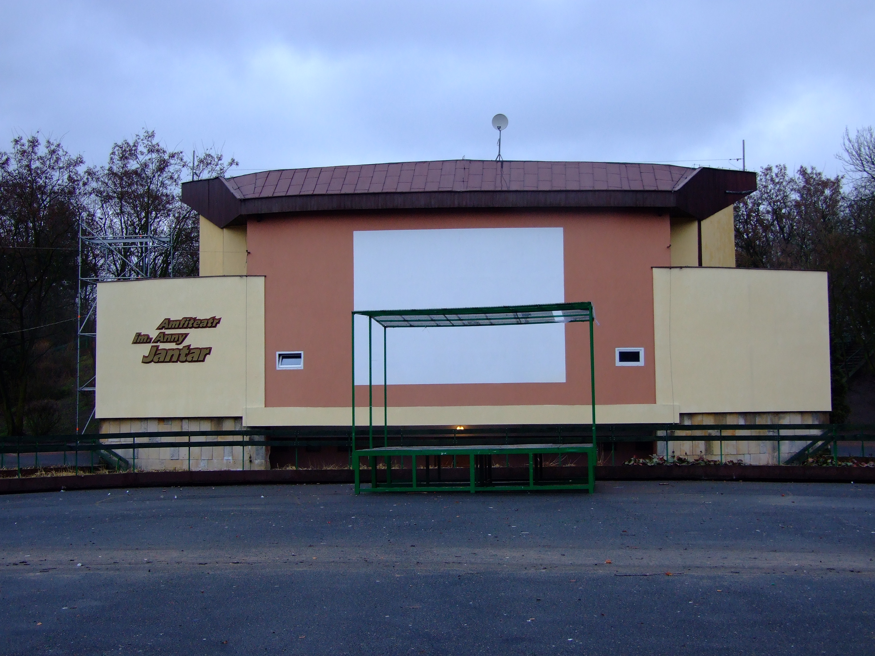 zdjęcie amfiteatru im. Anny Jantar we Wrześni